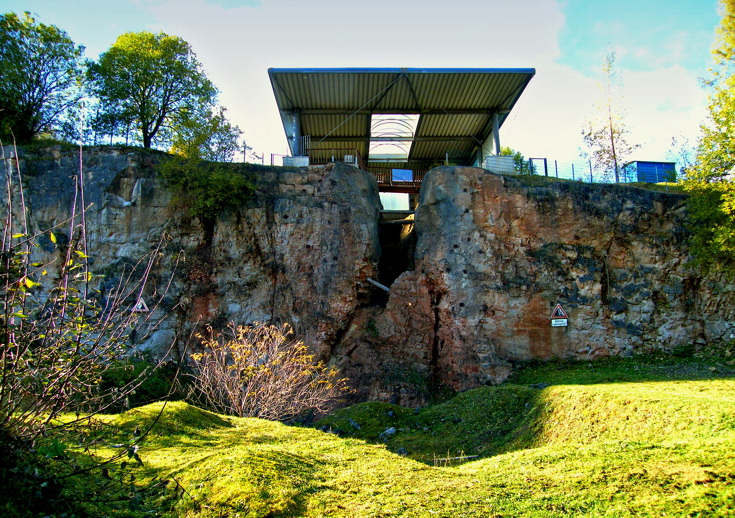 Korbacher Spalte - 20 Meter Tief, bis 3,50 m Breit, ca. ein Kilometer lang, verfüllte Erdspalte in der nordhessischen Kreisstadt